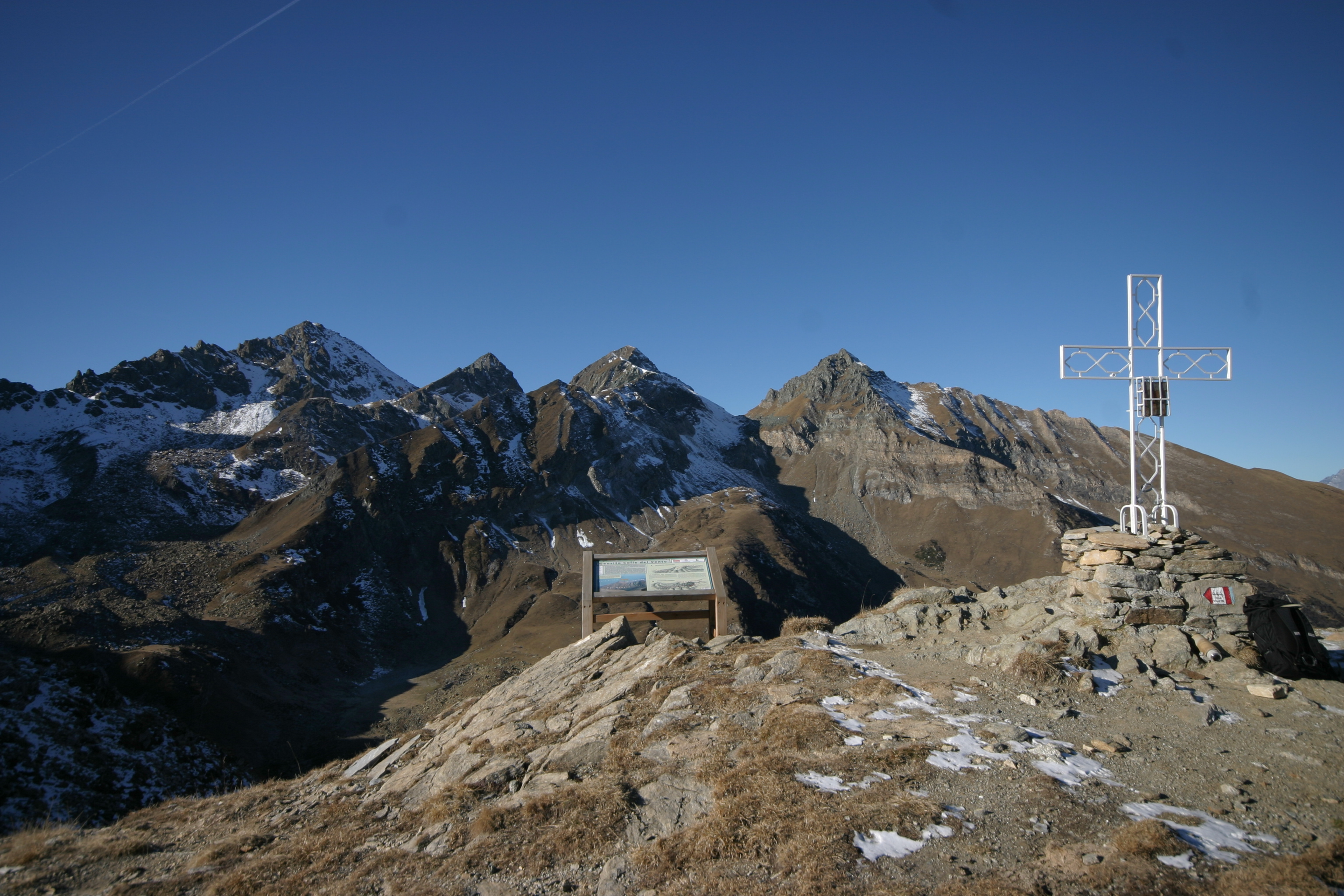 parco naturale Orsiera-Rocciavrè (Q2052054)